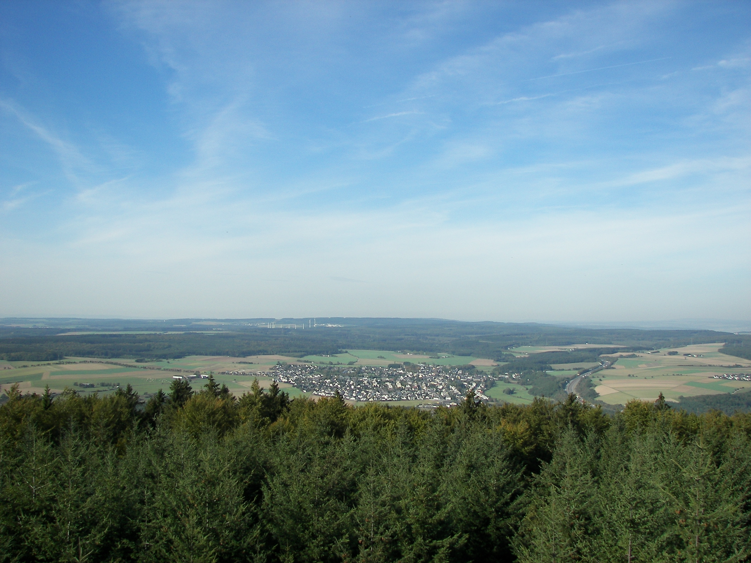 Rheinböllen, vom Hochsteinchen aus gesehen